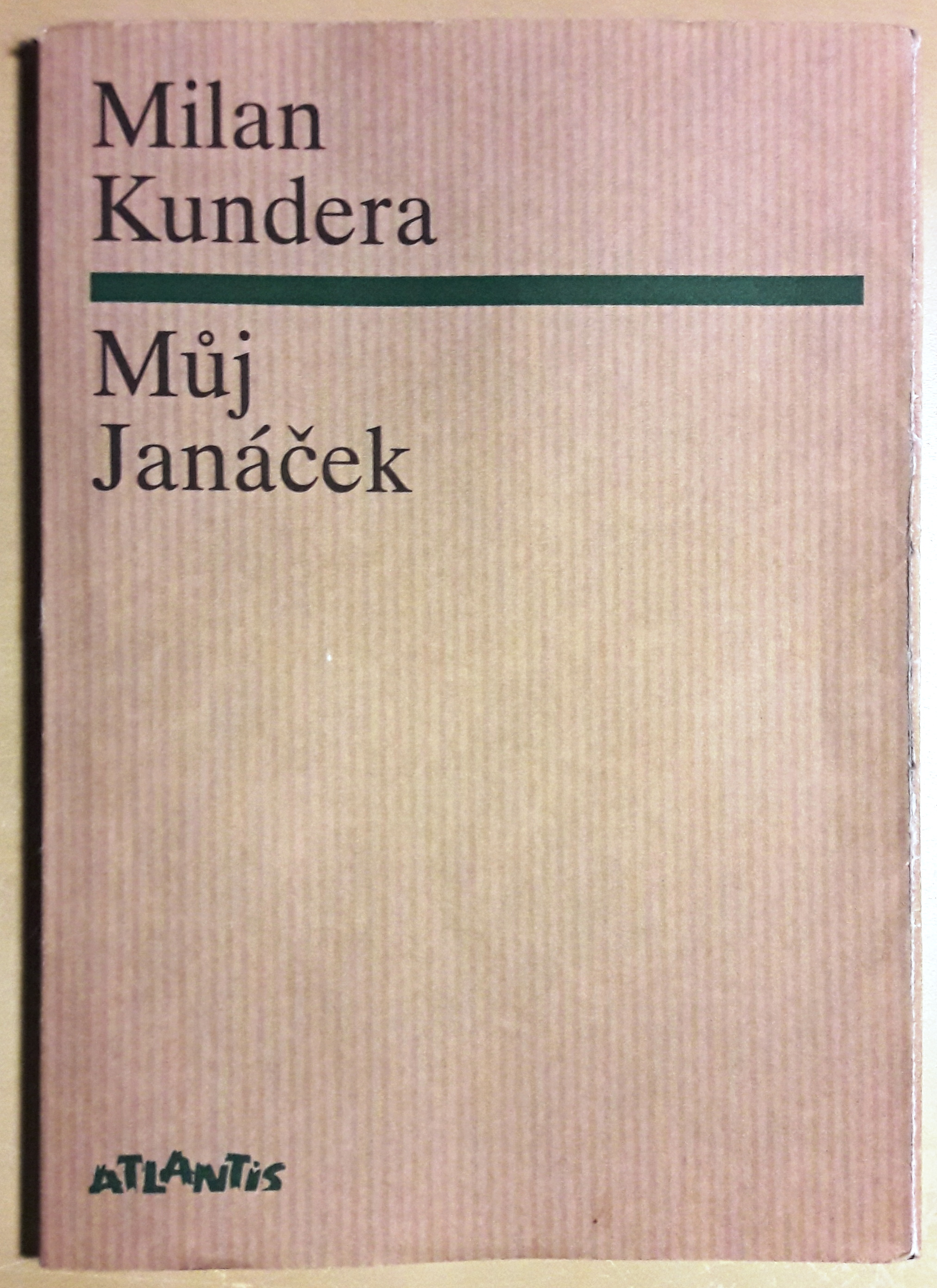 Milan Kundera - Můj Janáček